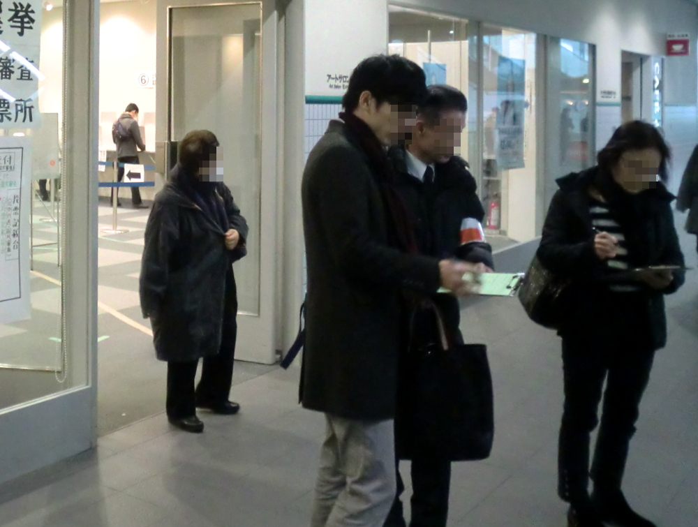 第47回衆議院議員総選挙における出口調査の様子。調査員（腕章をつけた人物）と調査に応じる2人の投票者。東京都文京区・文京シビックセンターにて。